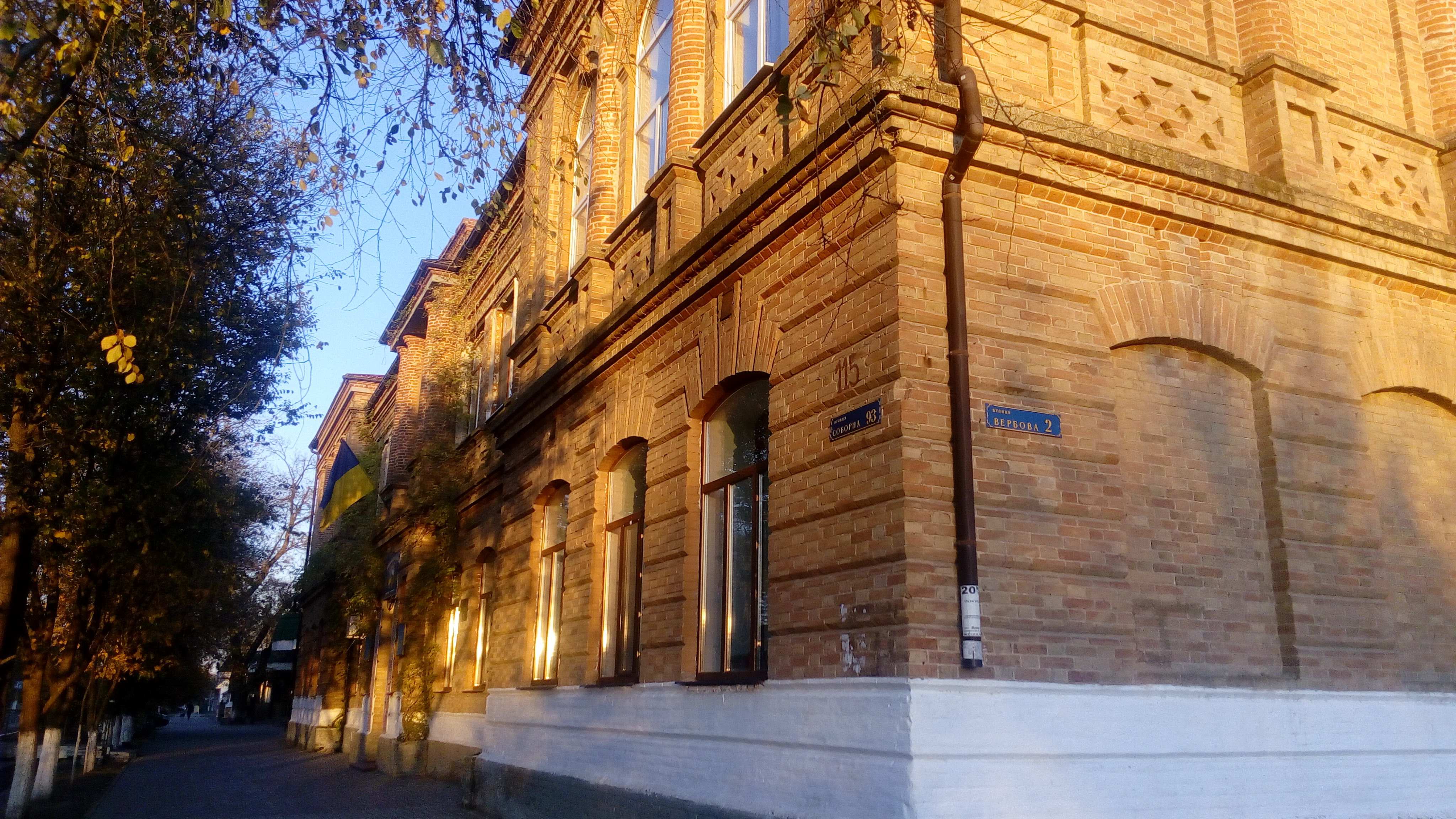 Будівля Приморського регіонального багатопрофільного українсько-болгарського ліцею